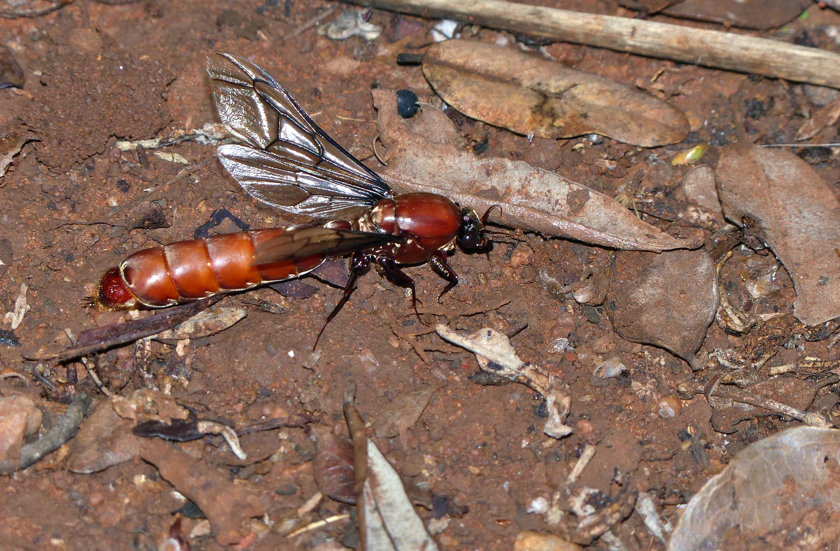 Punda Maria Camp, Kruger NP, SOUTH AFRICA